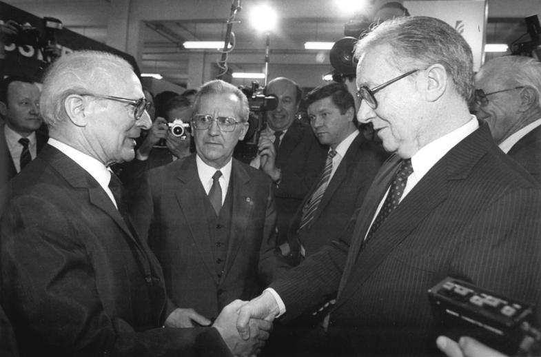 ADN-ZB Mittelstädt-15.3.87-A-Leipzig: Frühjahrsmesse-Rundgang- Während des traditionellen Eröffnungsrundganges wurde der Generalsekretär des ZK der SED und Vorsitzende des Staatsrates der DDR, Erich Honecker, von USA-Botschafter Francis Joseph Meehan (r.) begrüßt.